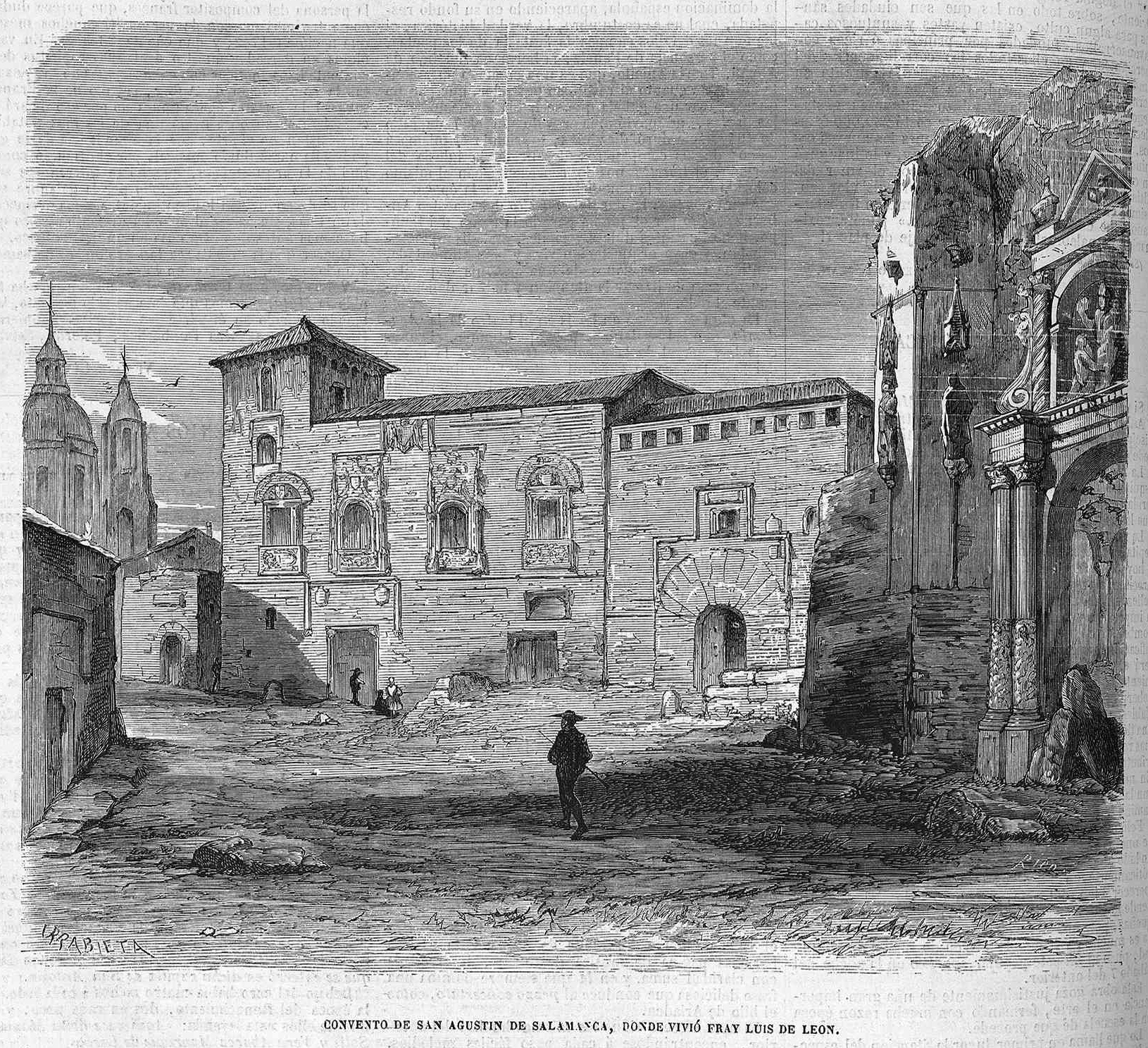 Convento de San Agustín de Salamanca, donde vivió Fray Luis de León, en la revista española El Museo Universal.